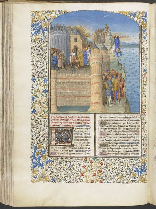 folio 110 verso d'un manuscrit du Livre des cas des nobles hommes et femmes traduit en Français par Laurent de Premierfait